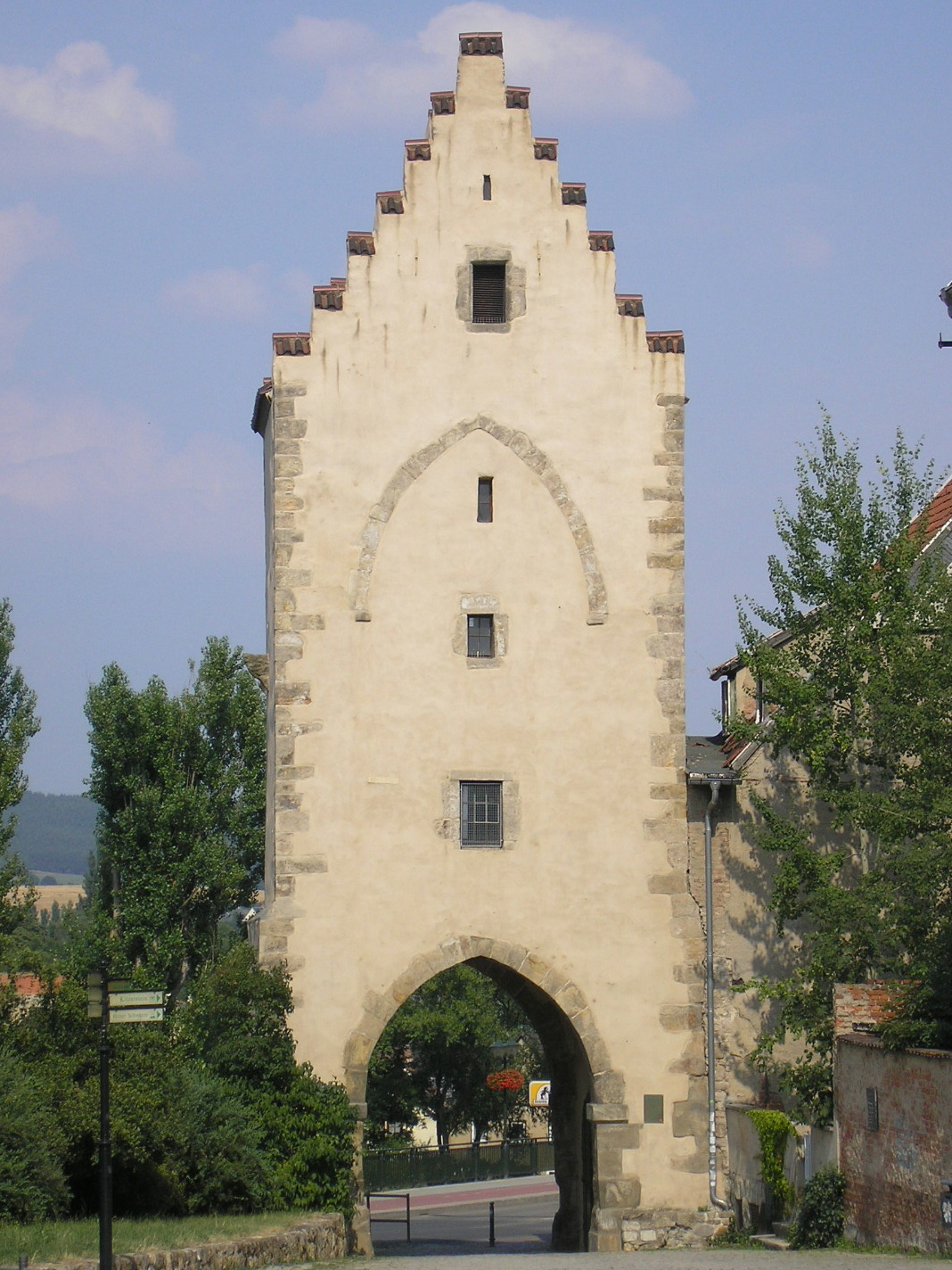 Das Saaltor in Saalfeld/Saale (Thüringen).